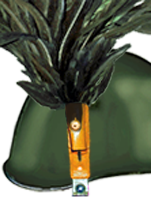 Accessorio porta piumetto per elmetto mod. M33 da bersagliere